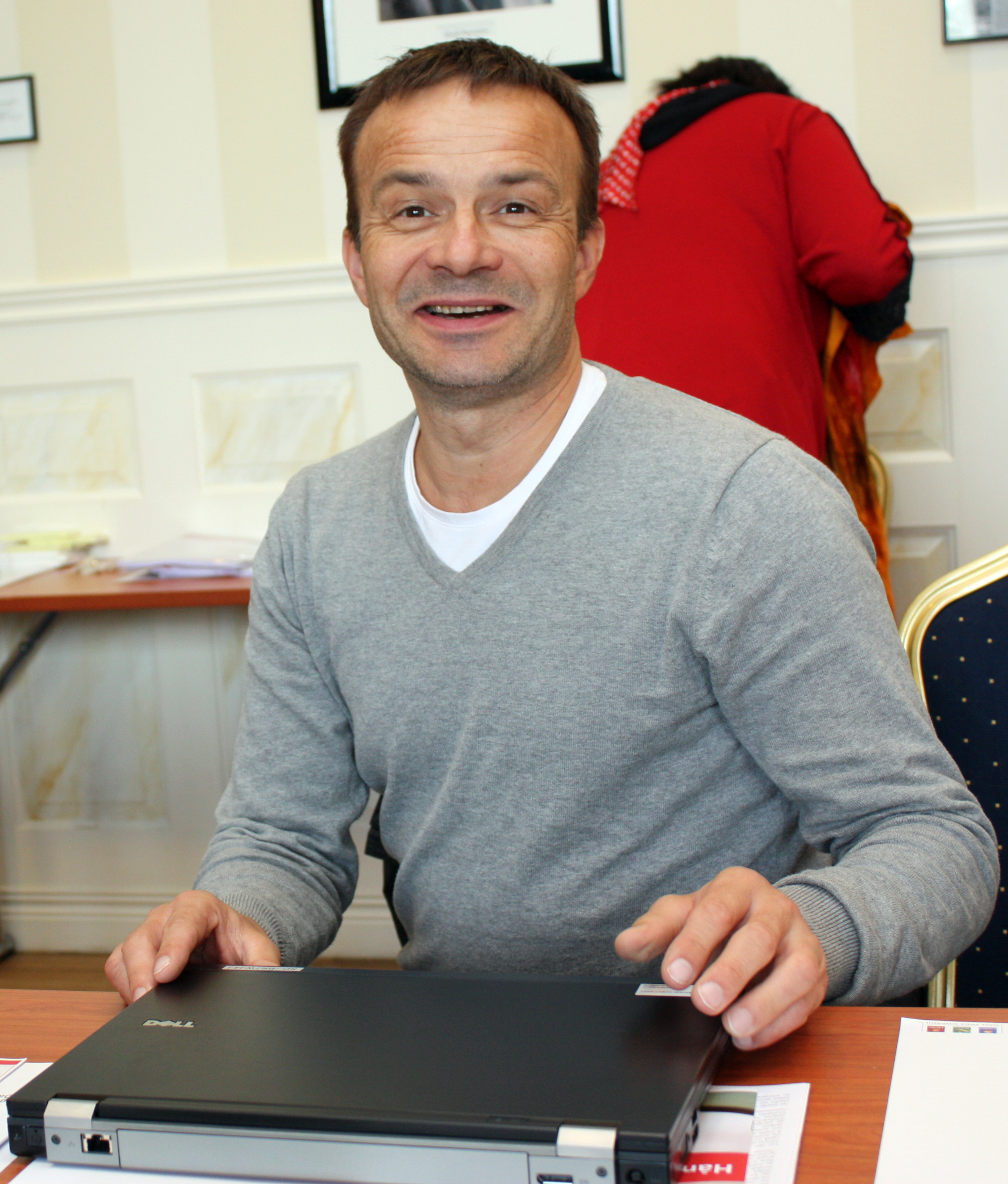 Willy Ørnebakk, sametingsrepresentant for Arbeiderpartiet i Nord-Troms valgkrets.